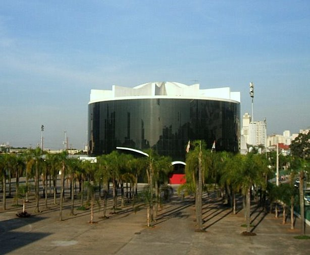 Antigo Parlamento Latino-Americano, no Memorial da América Latina, São Paulo, Brasil.